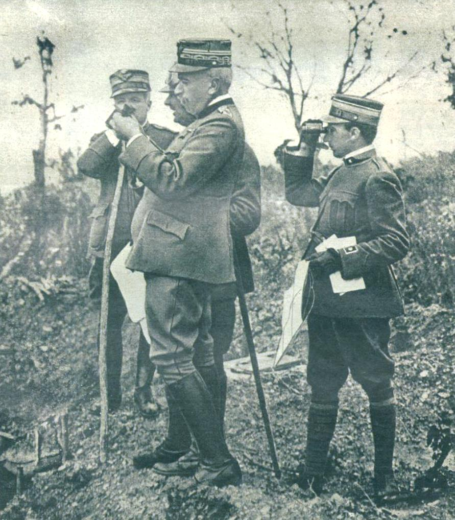 General Cadorna opazuje s častniki svojega generalnega štaba razvoj bojev vzhodno za Gorice